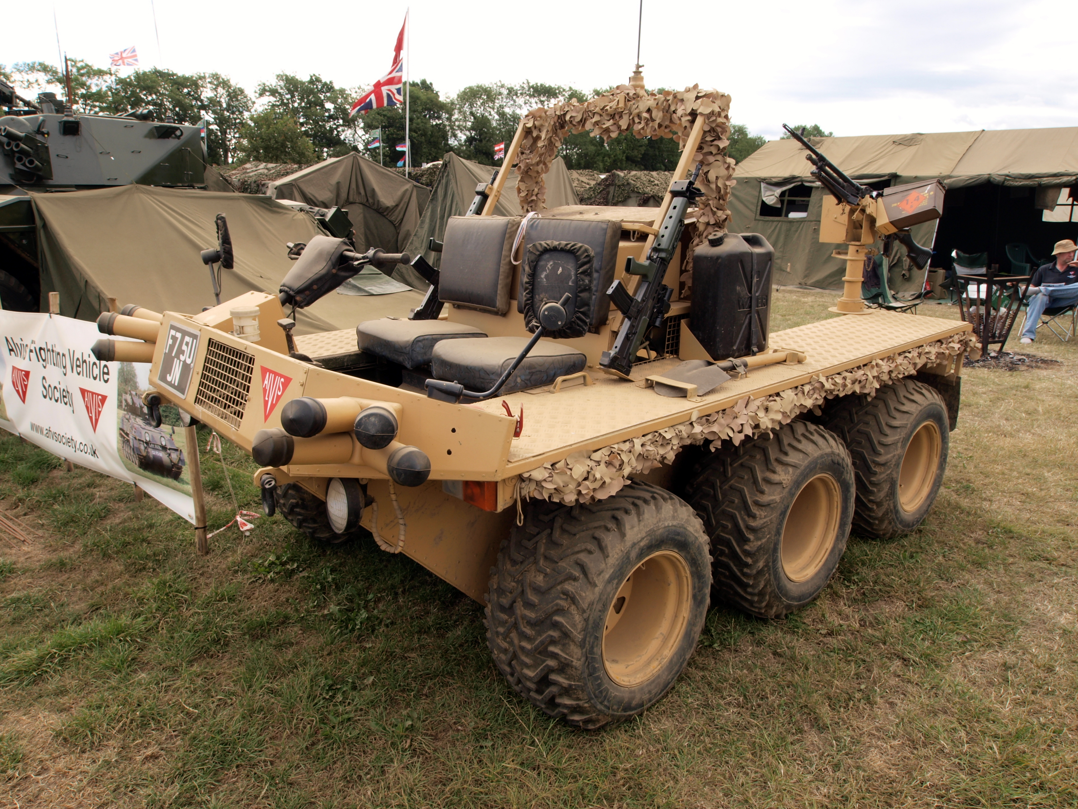 Alvis SUPACAT ATMP